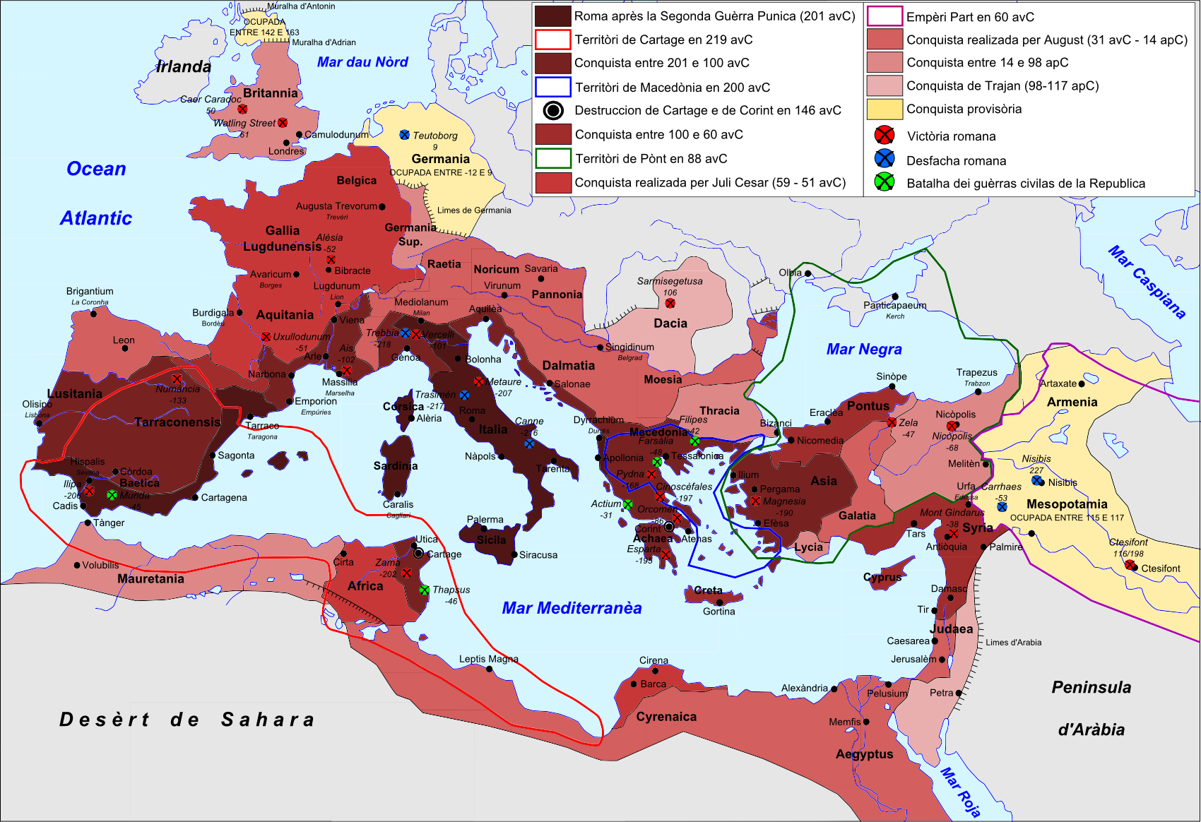 Expansion e formacion de l'Empèri Roman.